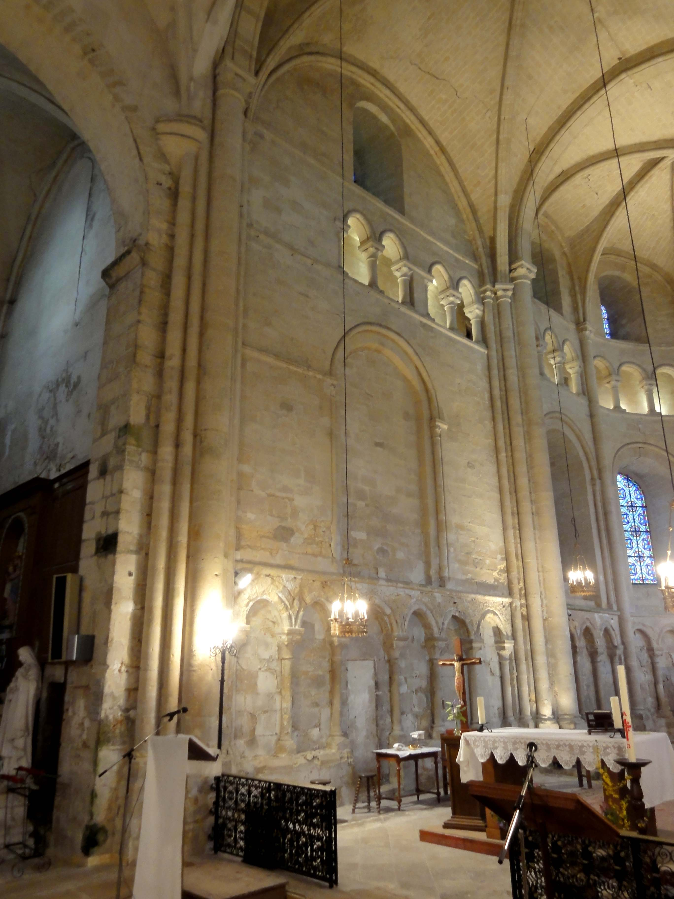 Intérieur de l'église - voir titre.